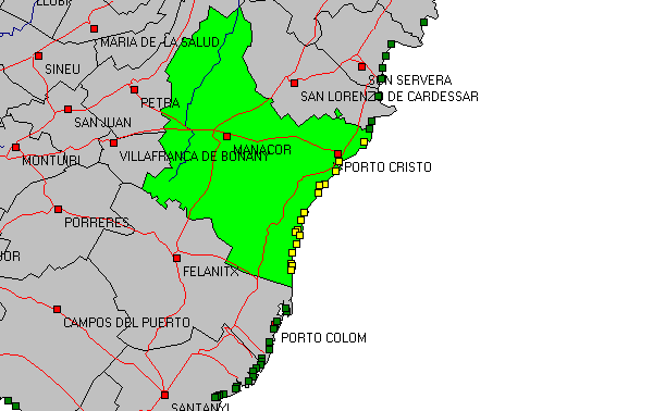 Skizze Strände Manacor